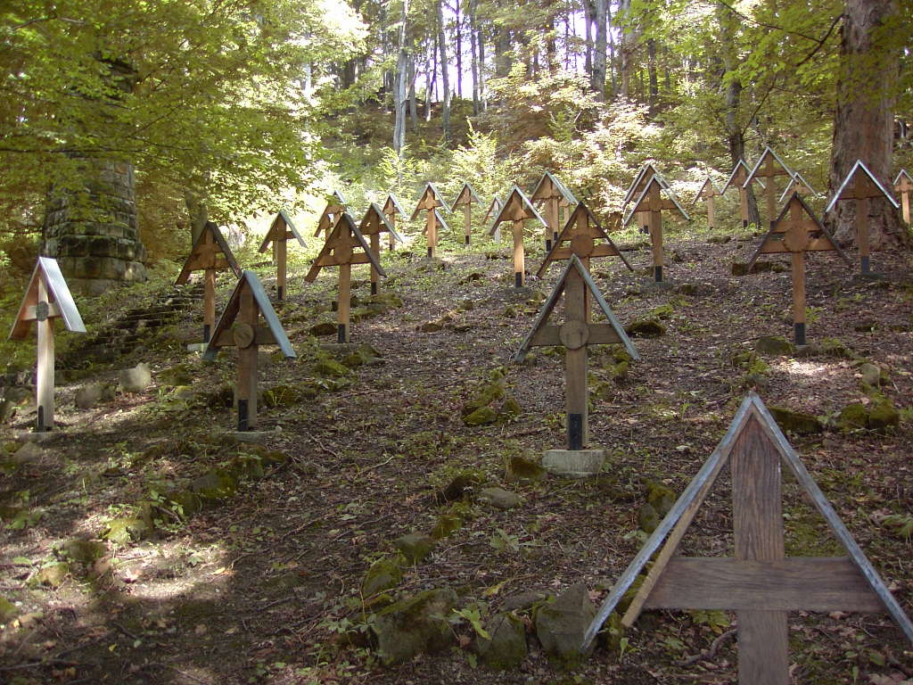 Cmentarz wojenny nr 123 w Łużnej.